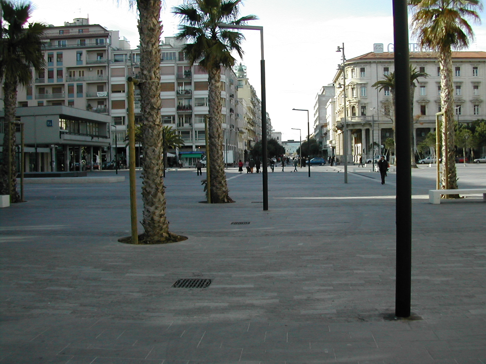 Piazza Salotto Pescara